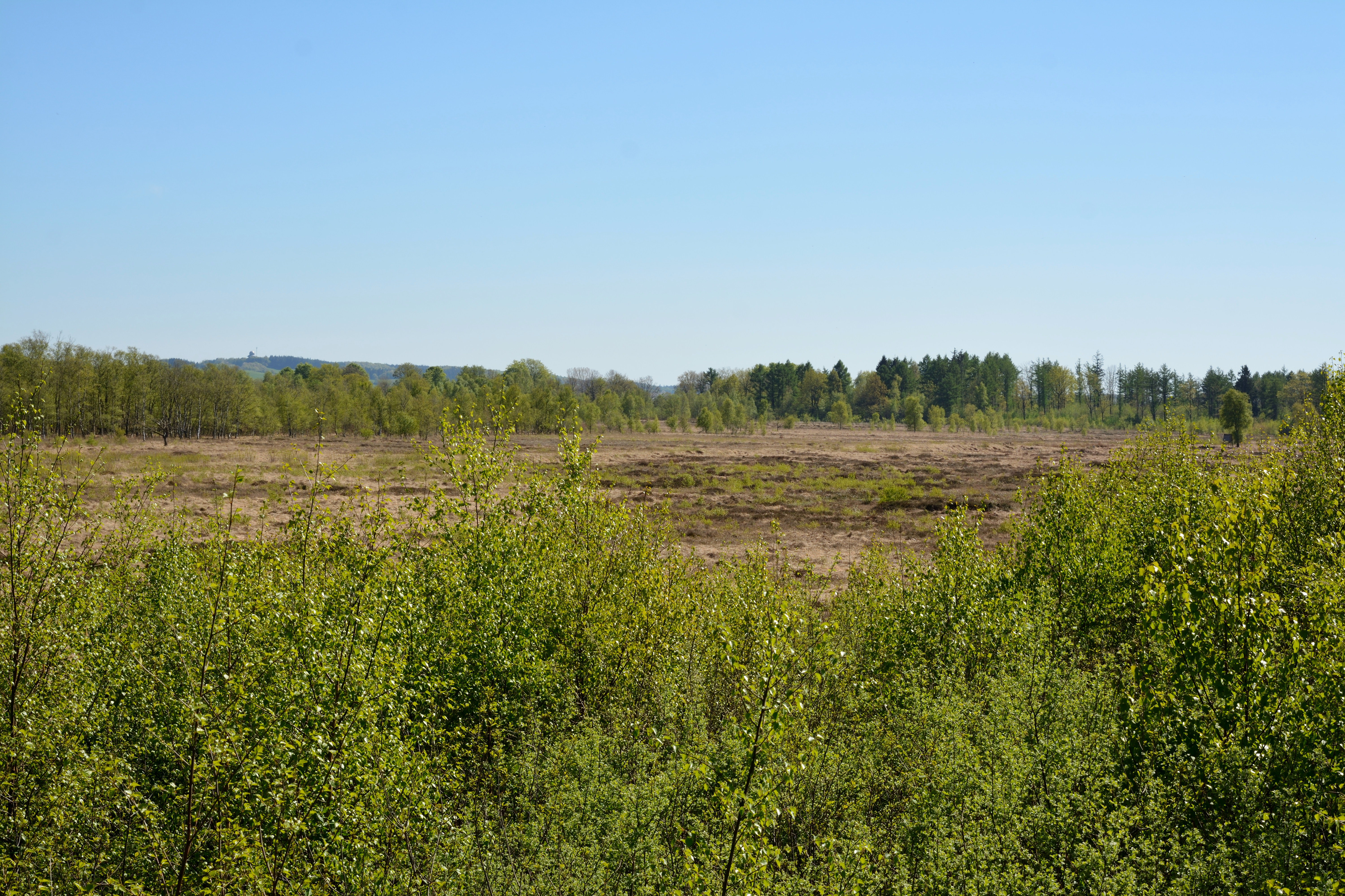 Impressionen aus dem Naturschutzgebiet "Esprehmer Moor" in Borgwedel